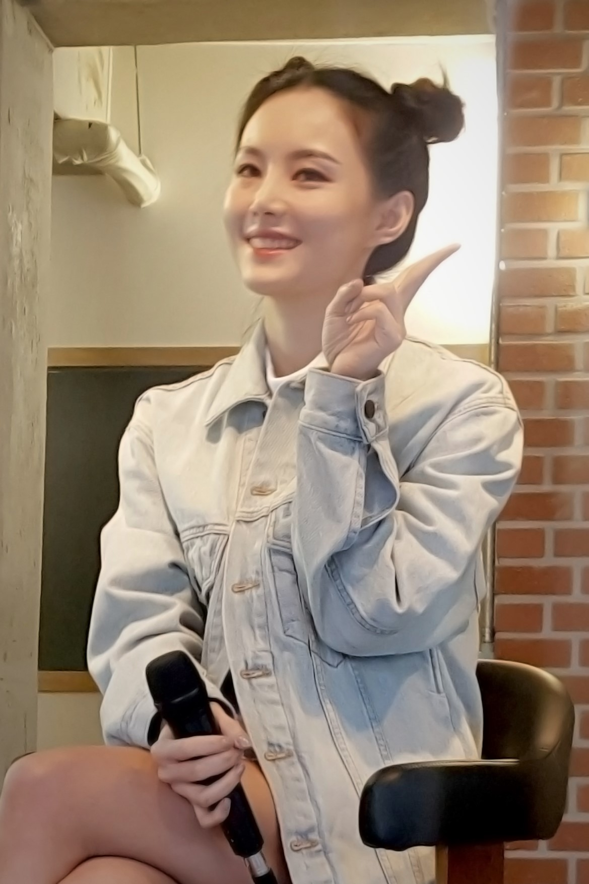 180524 미료 리슨스테이지 직찍